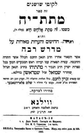 לערך מתתיהו שטראשון. מסר Alosha38